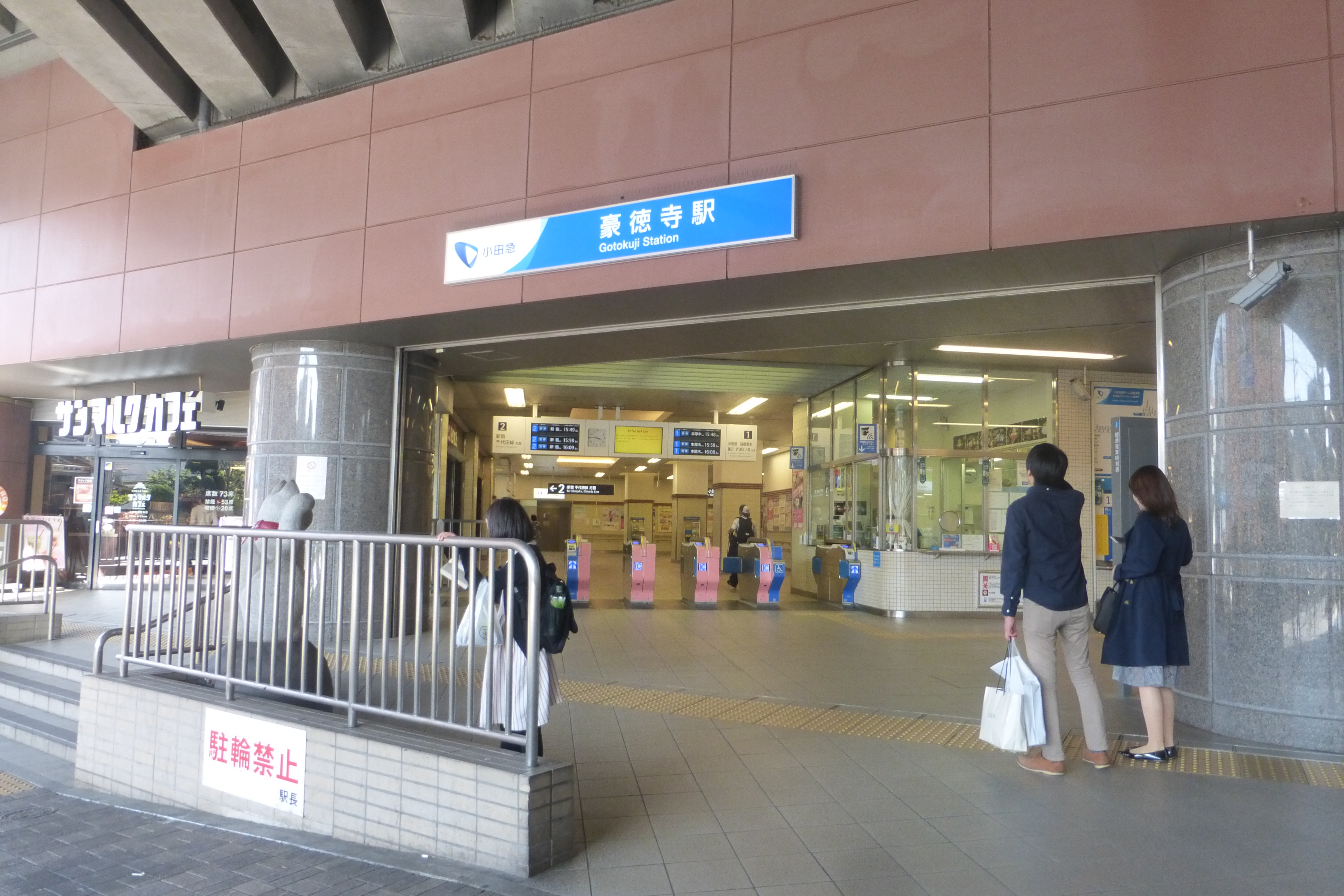 Gōtokuji Station (豪徳寺駅)